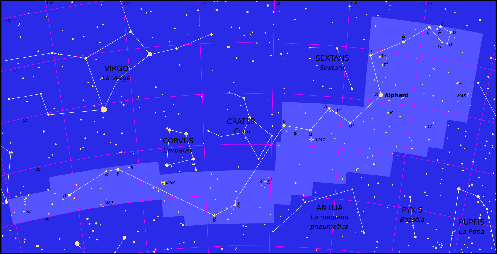 Constellacion de l'Idra.